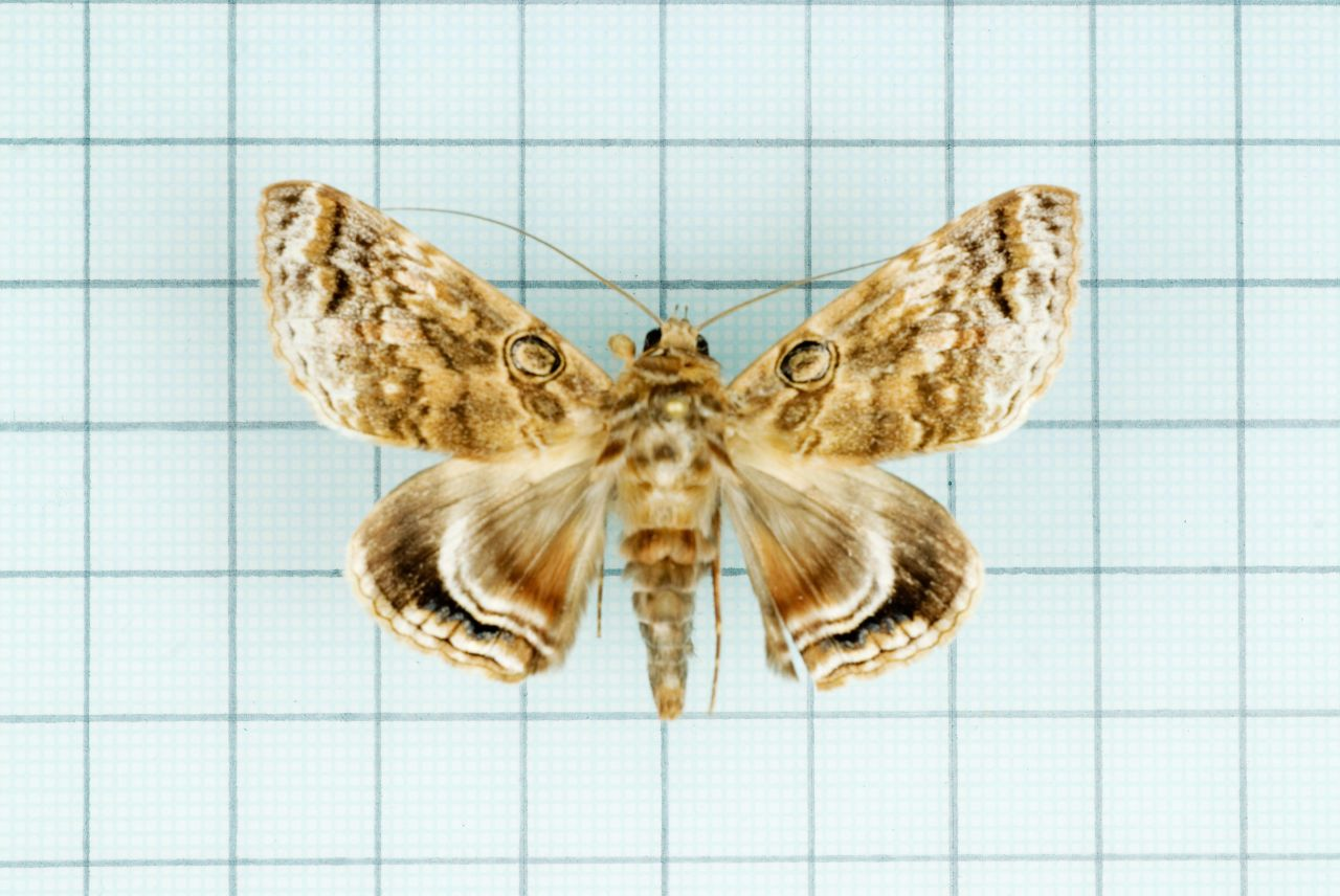 Cyclodes omma (Hoeven, 1840) 認識台灣的昆蟲 8 夜蛾科 P.125 male